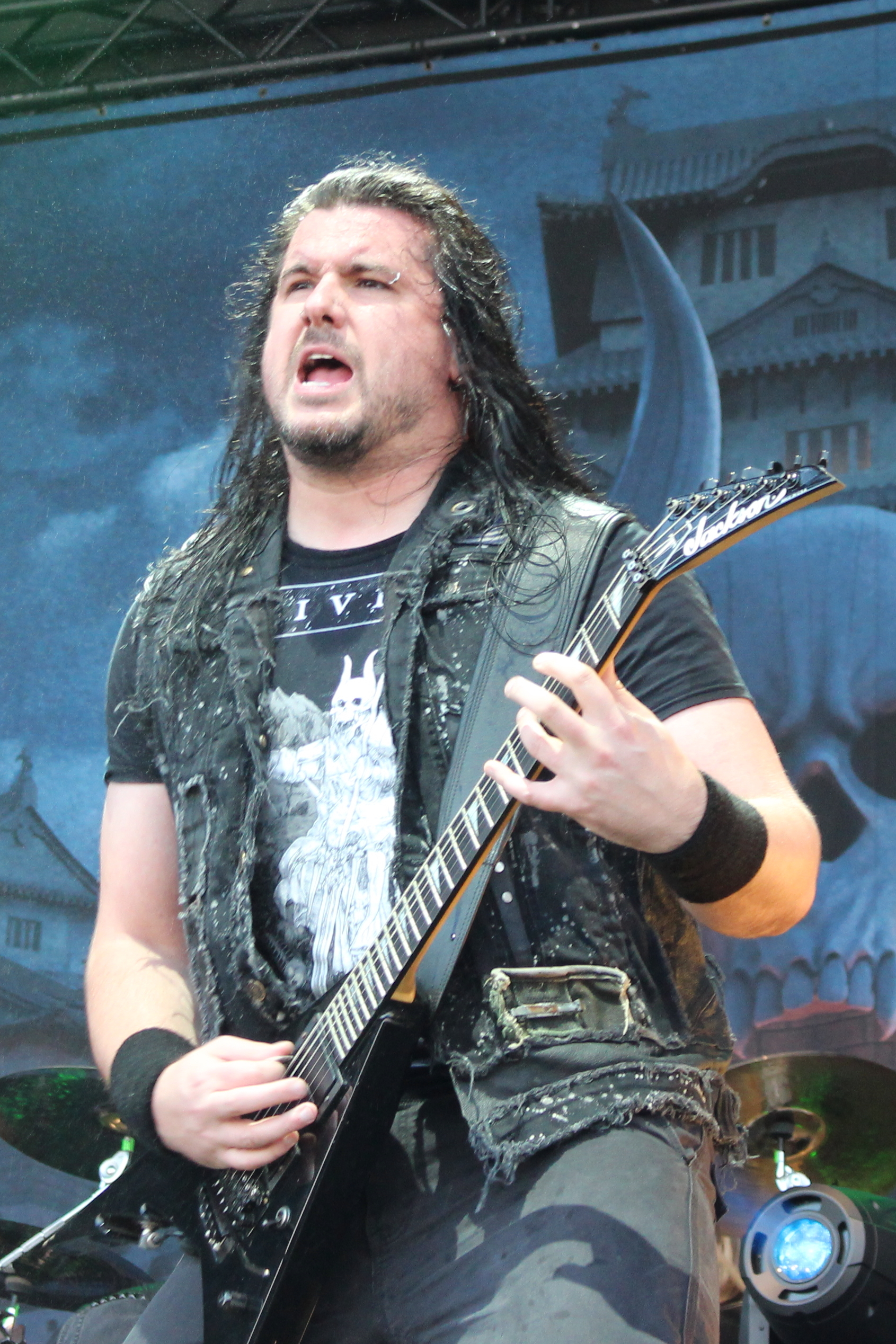 Festivalsommer This photo was created with the support of donations to Wikimedia Deutschland in the context of the CPB project "Festival Summer". Personality rights warningAlthough this work is freely licensed or in the public domain, the person(s) shown may have rights that legally restrict certain re-uses unless those depicted consent to such uses. In these cases, a model release or other evidence of consent could protect you from infringement claims.